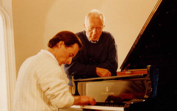 Alexis Weissenberg lors de masterclasses à Engelberg en 1995